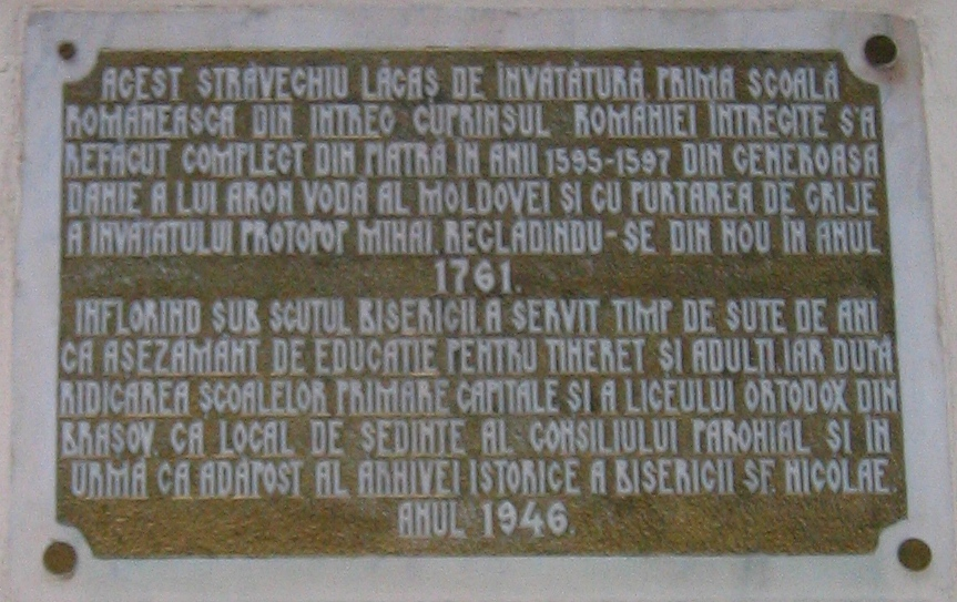 Placa de la intrarea in Prima scoala romaneasca